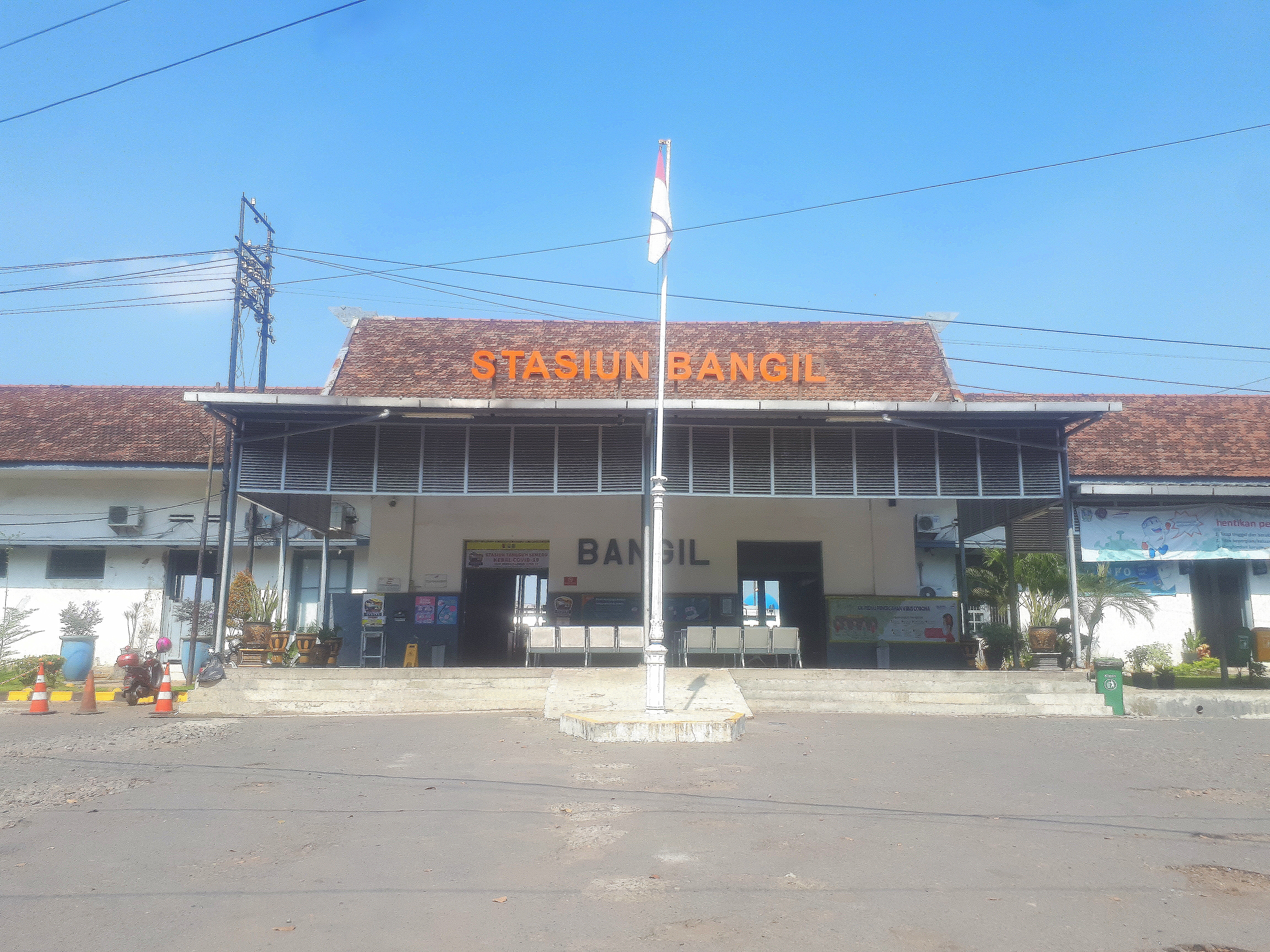 Tampak depan Stasiun Bangil, 2020